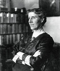 Novelist Charlotte Perkins Gilman